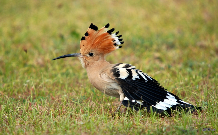 Kurdî: Min bi xwe kişandiye. Cî:Bismil/Amed Nîkon:D80/Sîgma 50-500mm